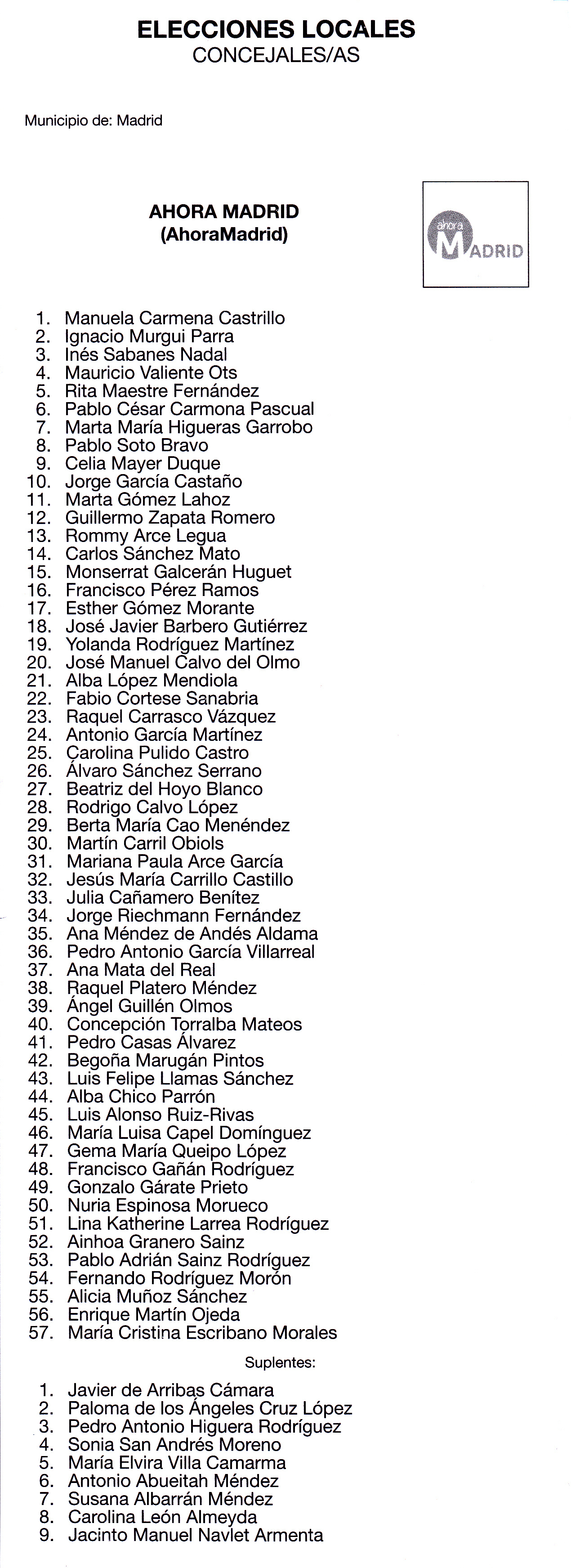 Papeleta electoral de la lista de Ahora Madrid en las elecciones municipales de Madrid de 2015.